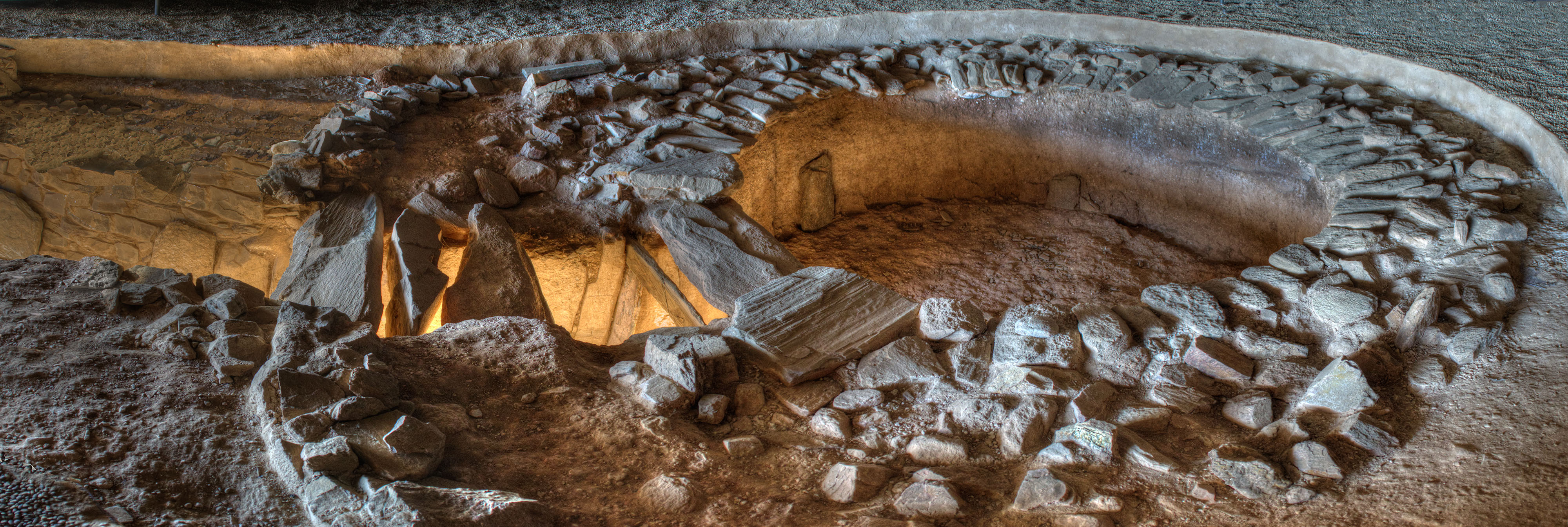 La tumba de Huerta Montero está en Almendralejo, Badajoz, y tiene una antigüedad de 4600 años (Edad del Bronce). En su interior se encontraron restos de 109 individuos acompañados de objetos. El diámetro de la cámara es de unos 4.5 m y se accede a ella por un corredor de apenas 1.2 m de alto y 4 m de longitud. La cámara estaba cubierta por una falsa cúpula, no por una losa como es común en los dólmenes. La luz en el corredor es la del Sol, que en estas fechas penetra directamente en él llegando a iluminar el suelo de la cámara.